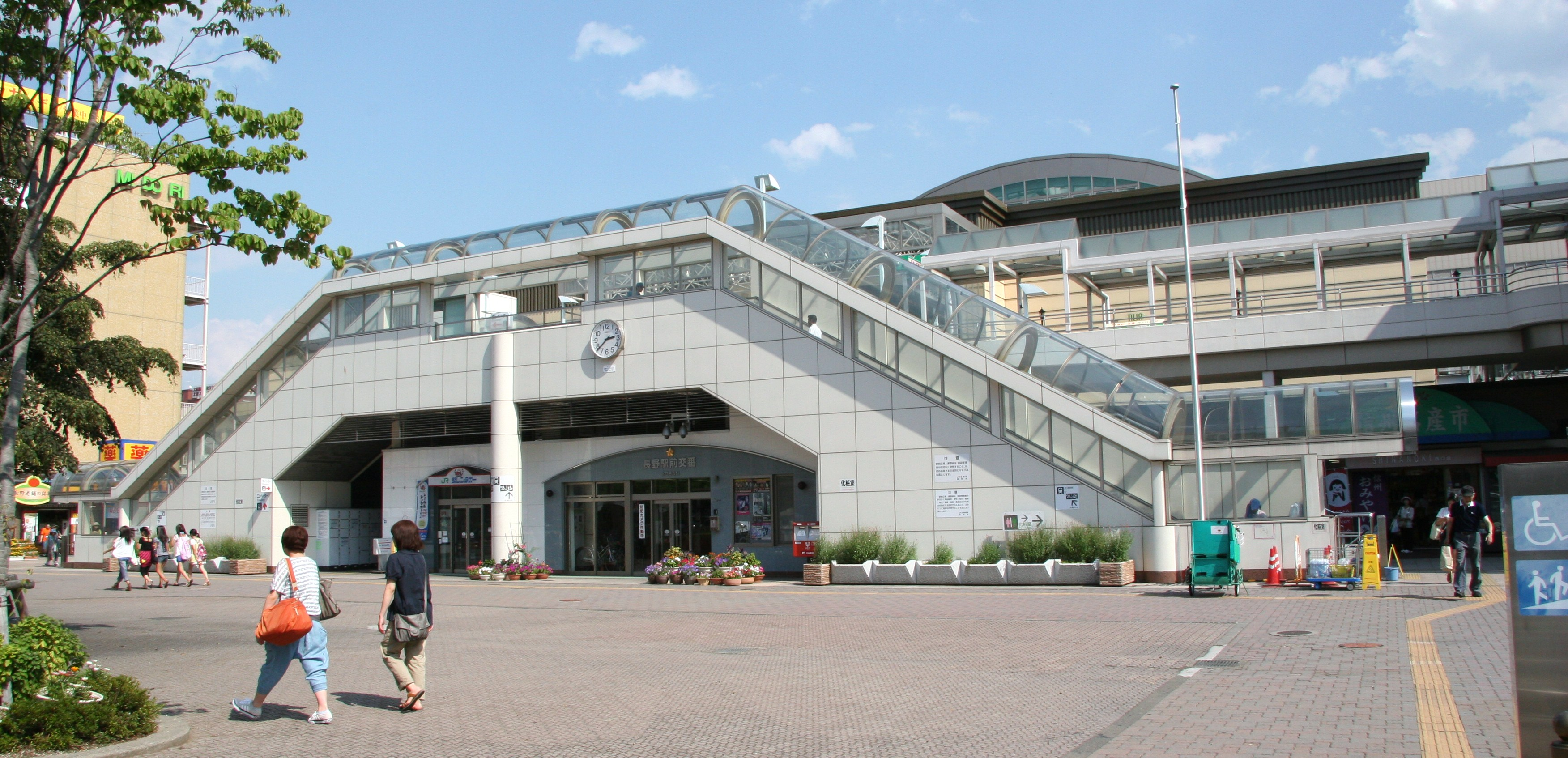 Nagano Station